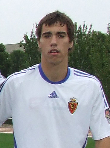 Álex Sánchez